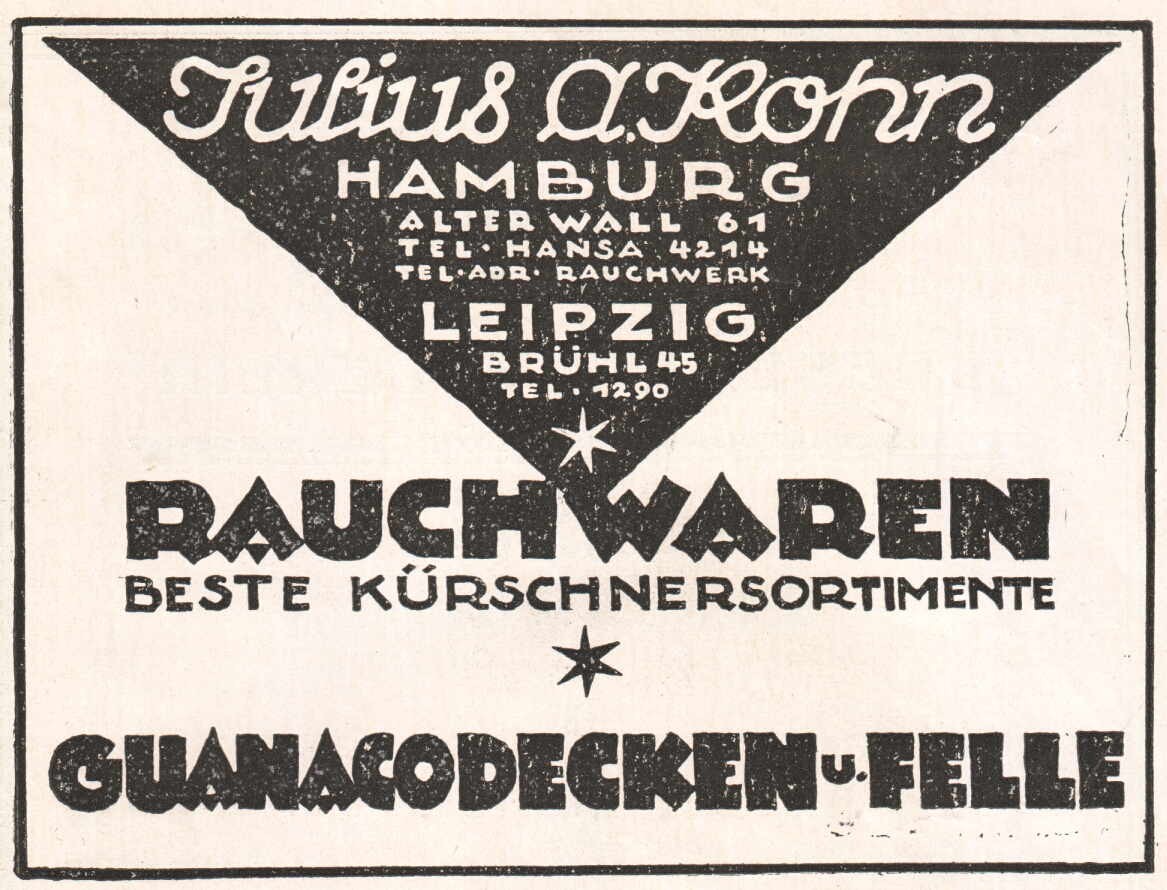 Anzeige des Rauchwarenhändlers Julius A. Kohn, Alter Wall 61, Hamburg und Brühl 45, Leipzig Rauchwaren, beste Kürschnersortimente. Guanakodecken u. Felle aus Der Rauchwarenmarkt, Berlin, 1922, Seite 11